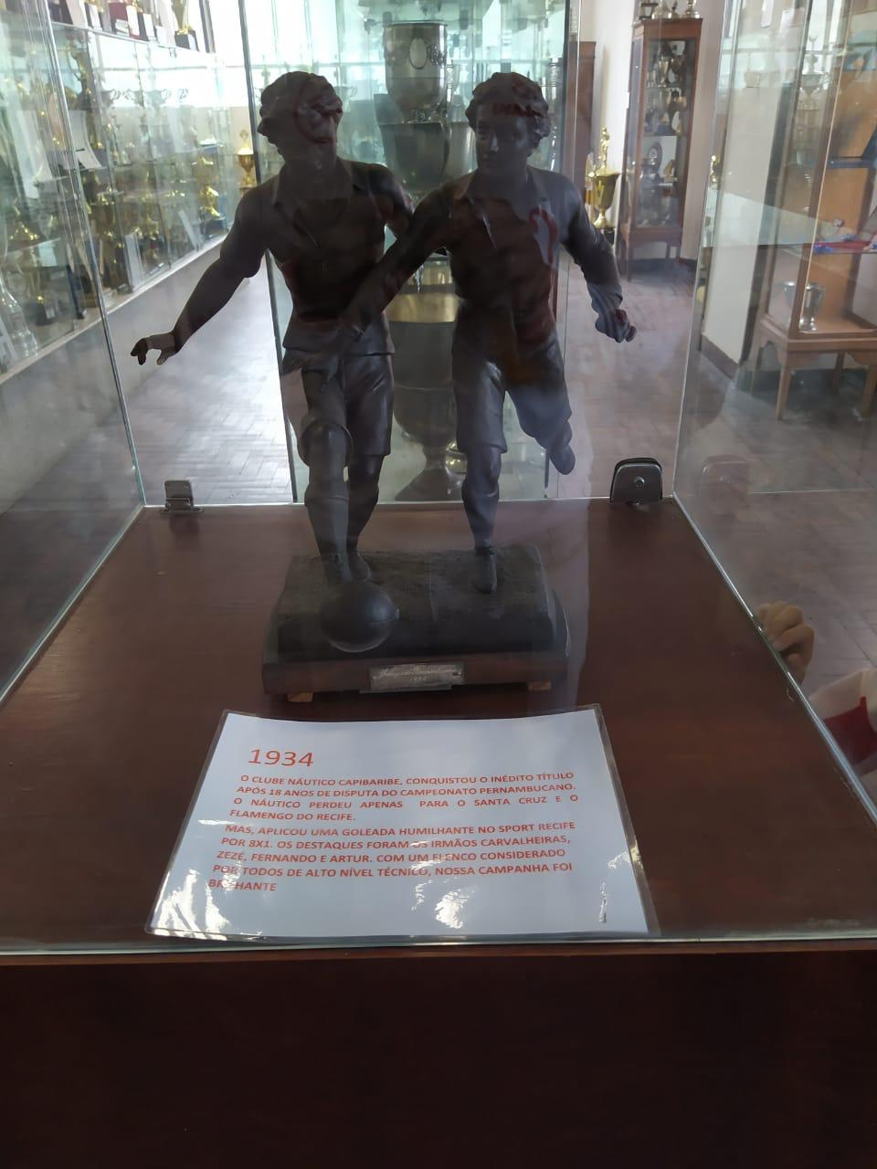 Taça de Campeão Pernambucano de 1934, a primeira conquistada pelo Náutico no futebol.